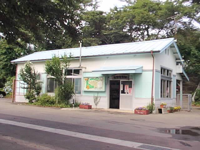 JR東日本 吉里吉里駅駅舎